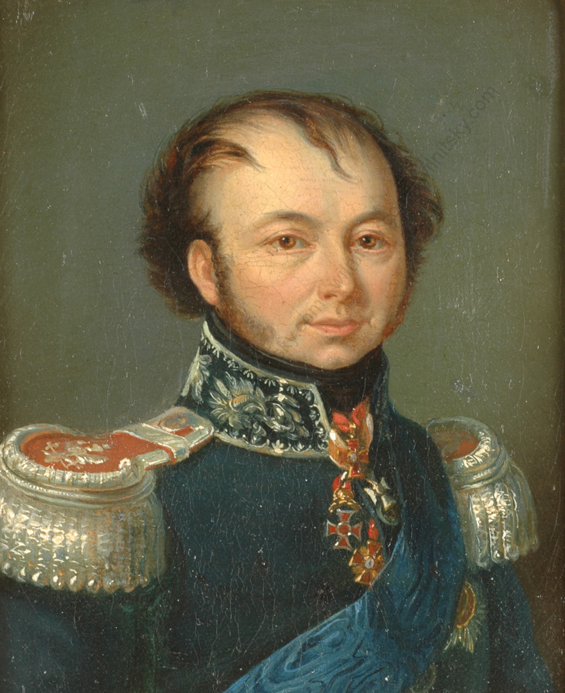 Беларуская (тарашкевіца): Партрэт Францішка Ксавэрыя Друцкага-Любецкага (Francišak Ksavery Drucki-Lubiecki)